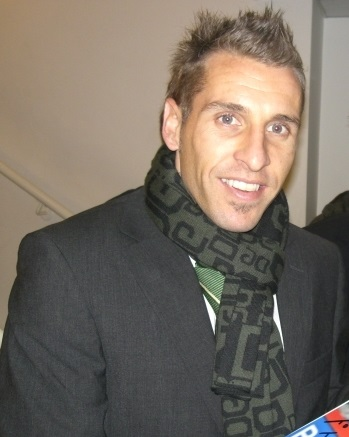 Darren Huckerby